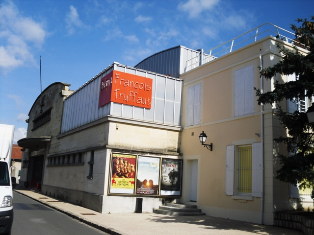 La salle de cinéma François Truffaut de Chilly-Mazarin (Essonne, Île-de-France, France).